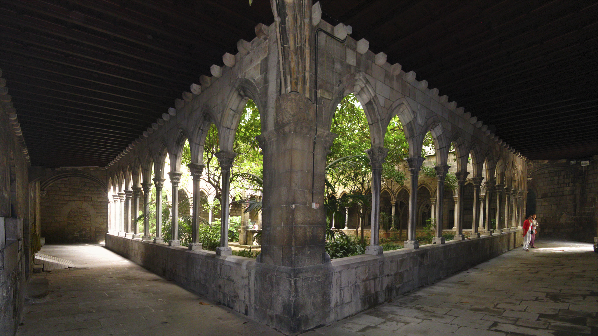 Claustro de Iglesia Santa Anna Barcelona, agosto de 2011